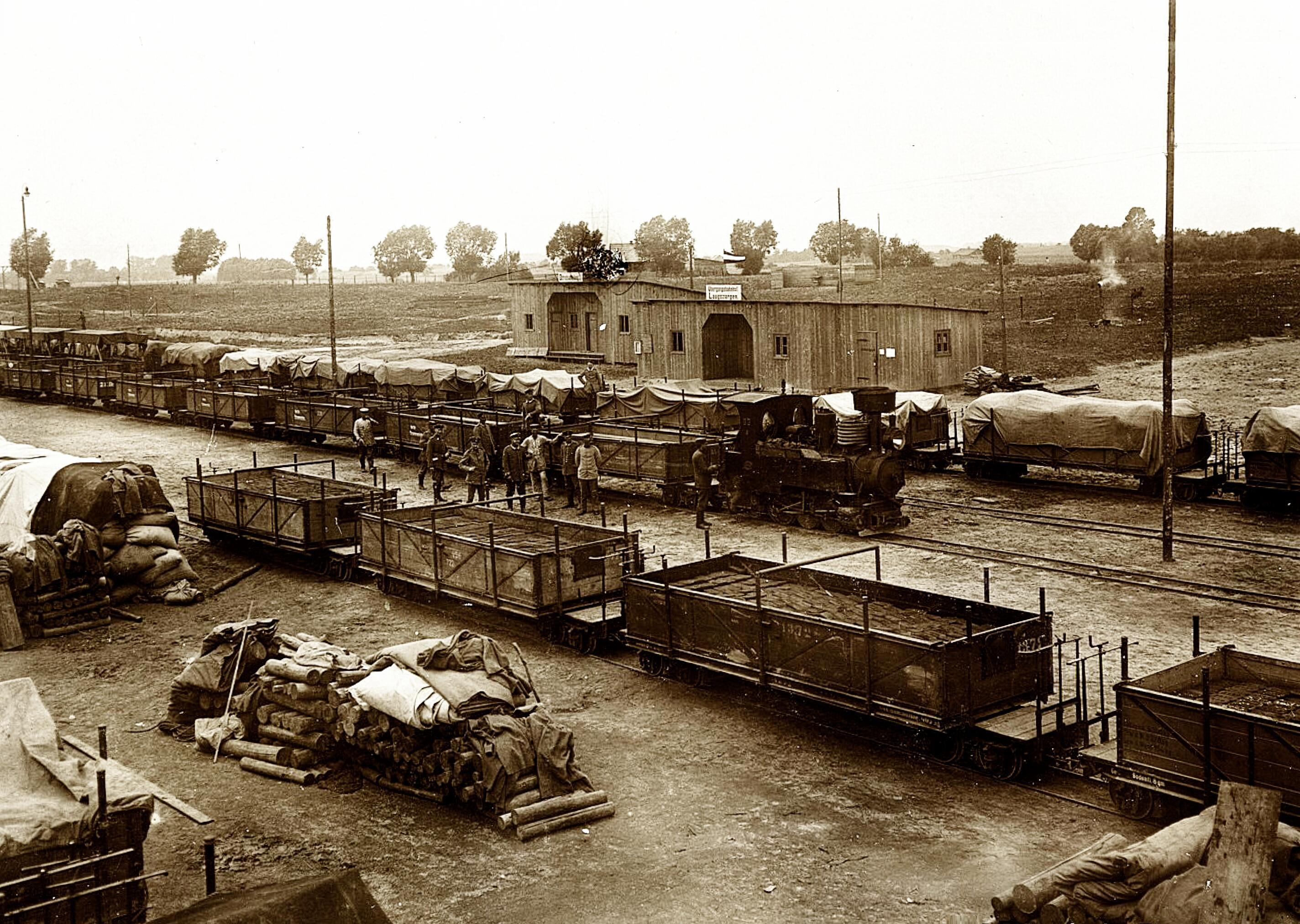 Übergabebahnhof Laugszargen im Sommer 1915. Zu sehen sind mehrere offene Brigadewagen (u.a. mit den Wagennummern 2450, 722, 1372, 229 und 1460, soweit erkennbar), sowie die Cn2t Illing-Dampflokomotive 83 B (Krauss Fabr-Nr. 4559, Bj. 1901).